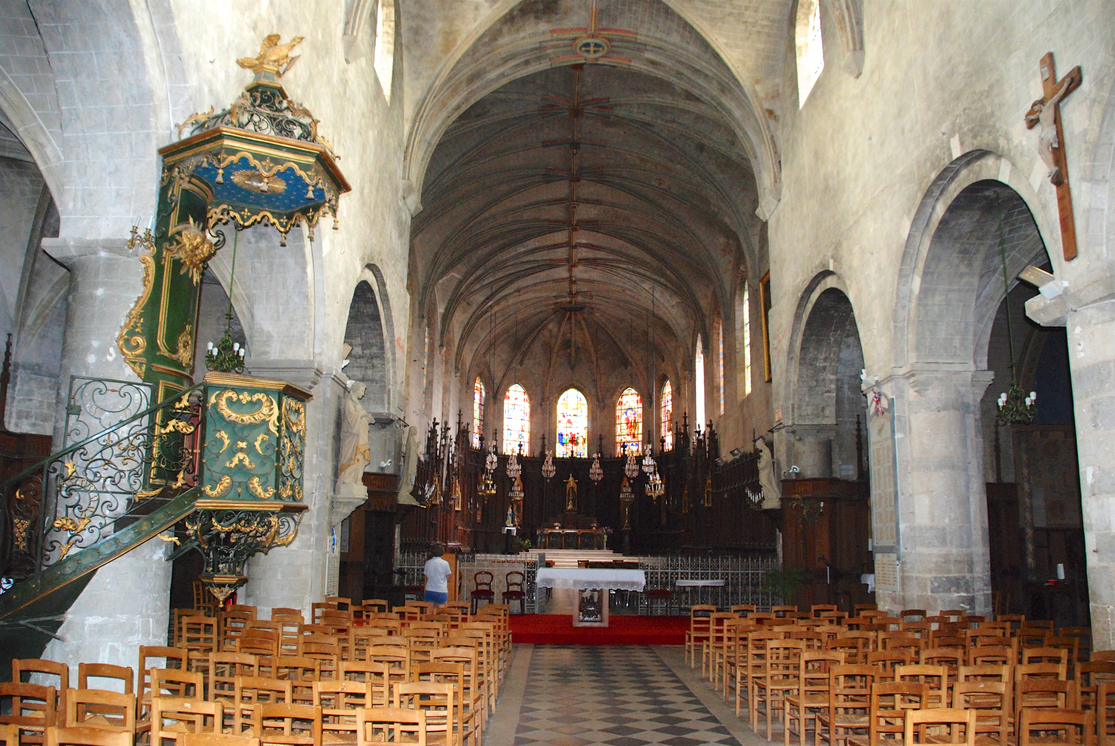 Chaire de l'église Saint-Étienne de Jargeau.